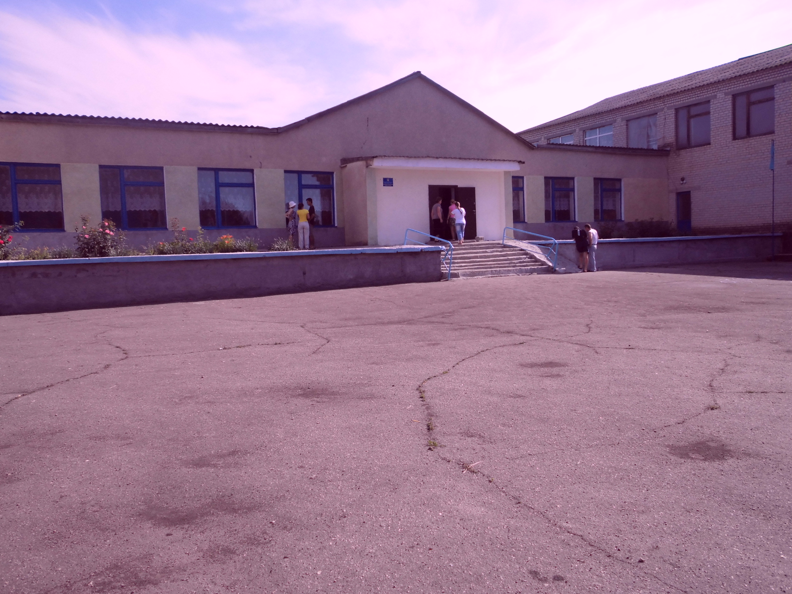 Нова школа.